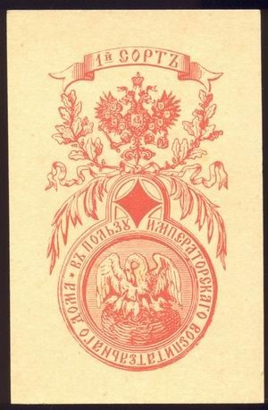 Атласная колода игральных карт по эскизам академика А. И. Шарлеманя. 1 сорт. Туз бубён